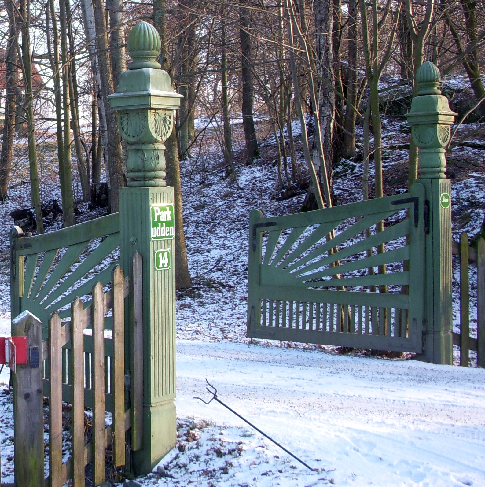 Villa Parkudden på Djurgården, grindstolpar, design Ferdinand Boberg